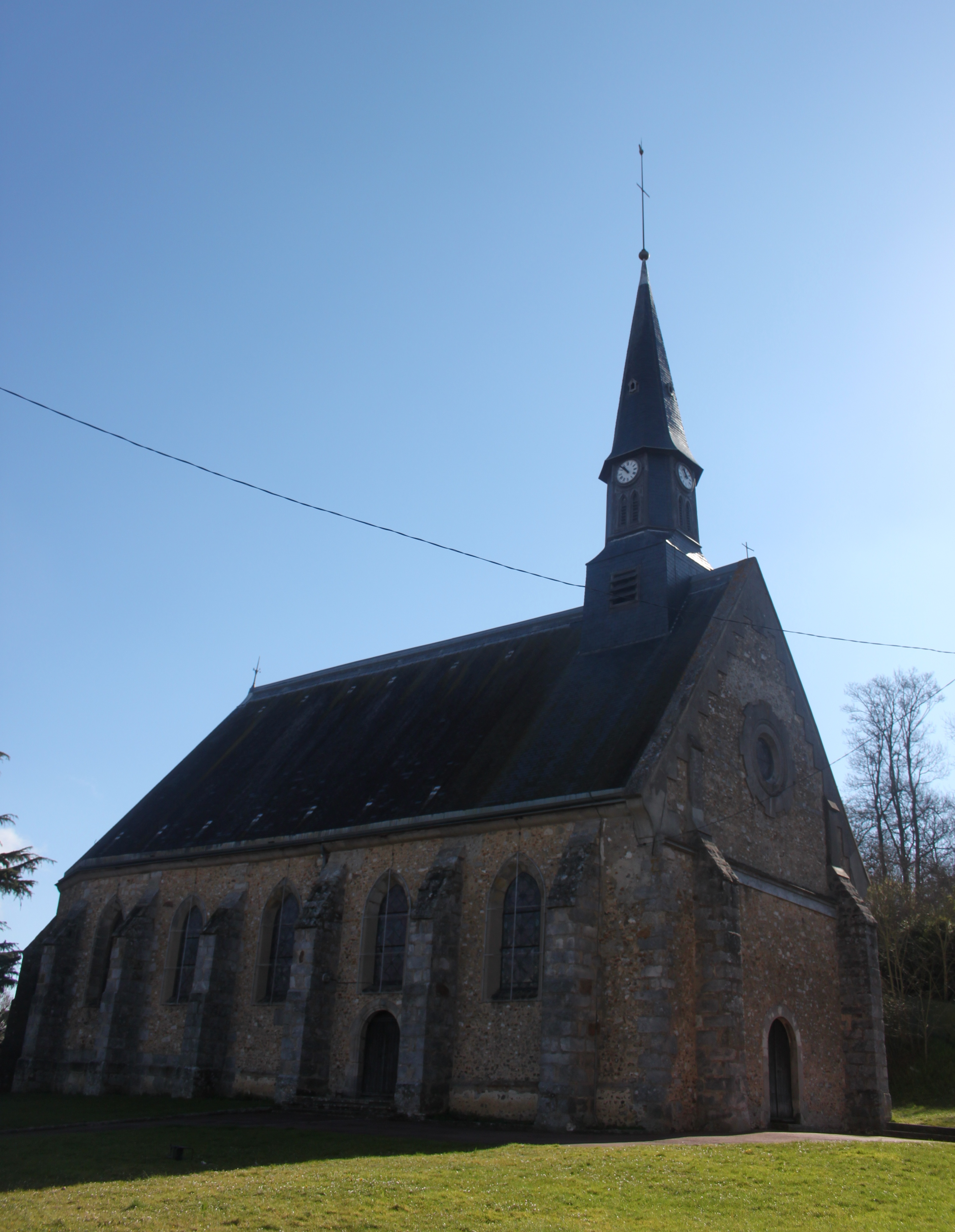 Eglise de Villiers-le-Morhier en Eure-et-Loir